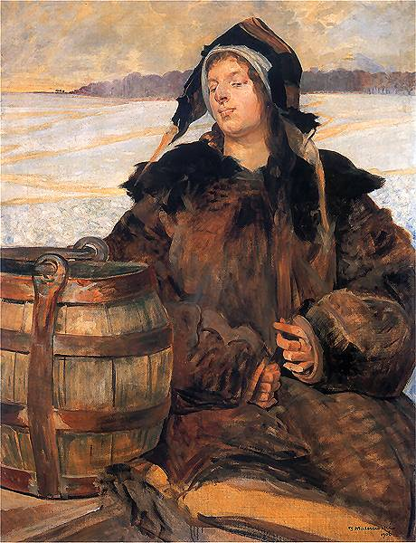 Jacek Malczewski (1854-1929) – polski malarz symbolista. Zatruta studnia 5